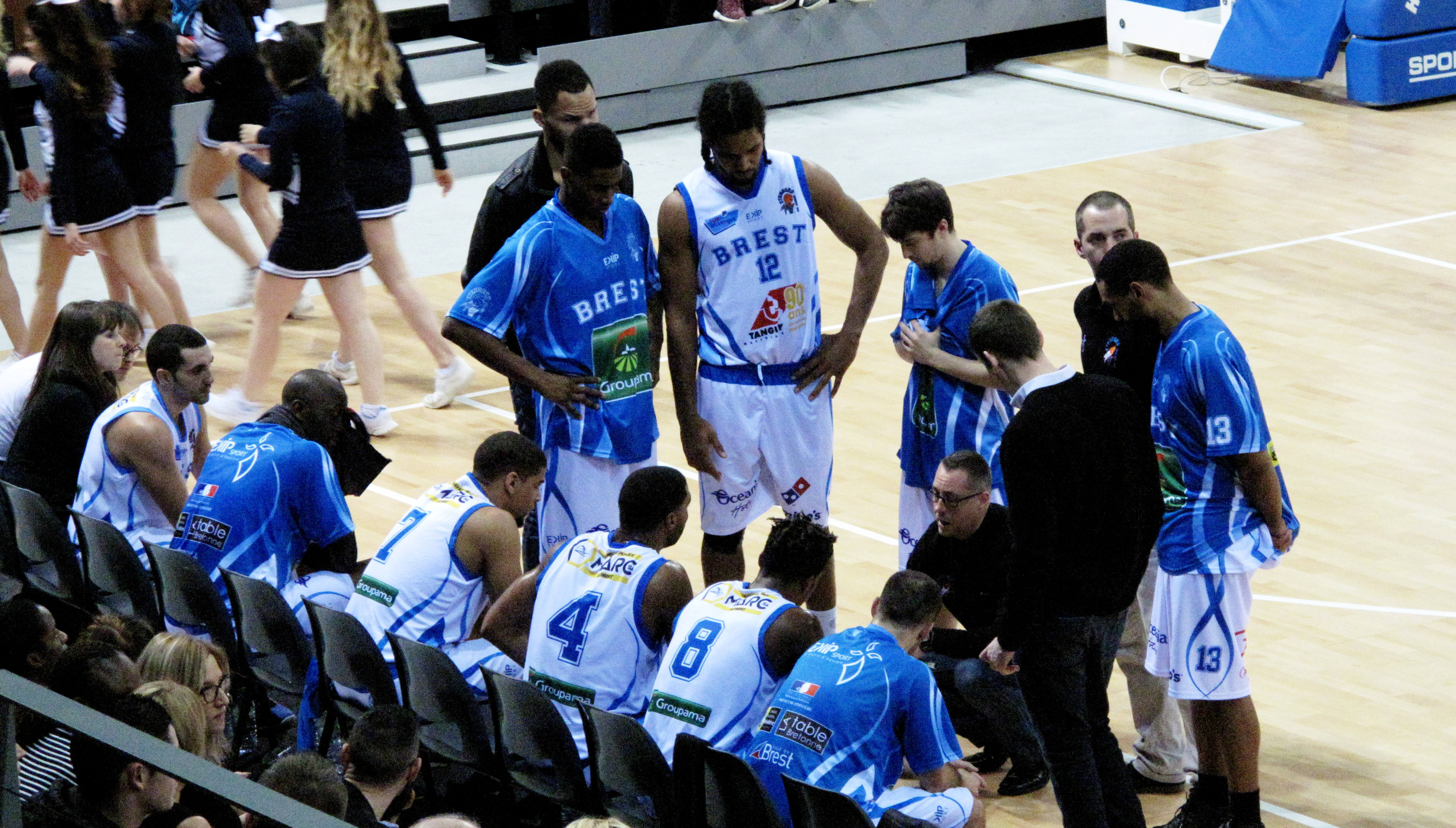 Match Etendard de Brest - Ardres à l'Arena de Brest Temps Mort